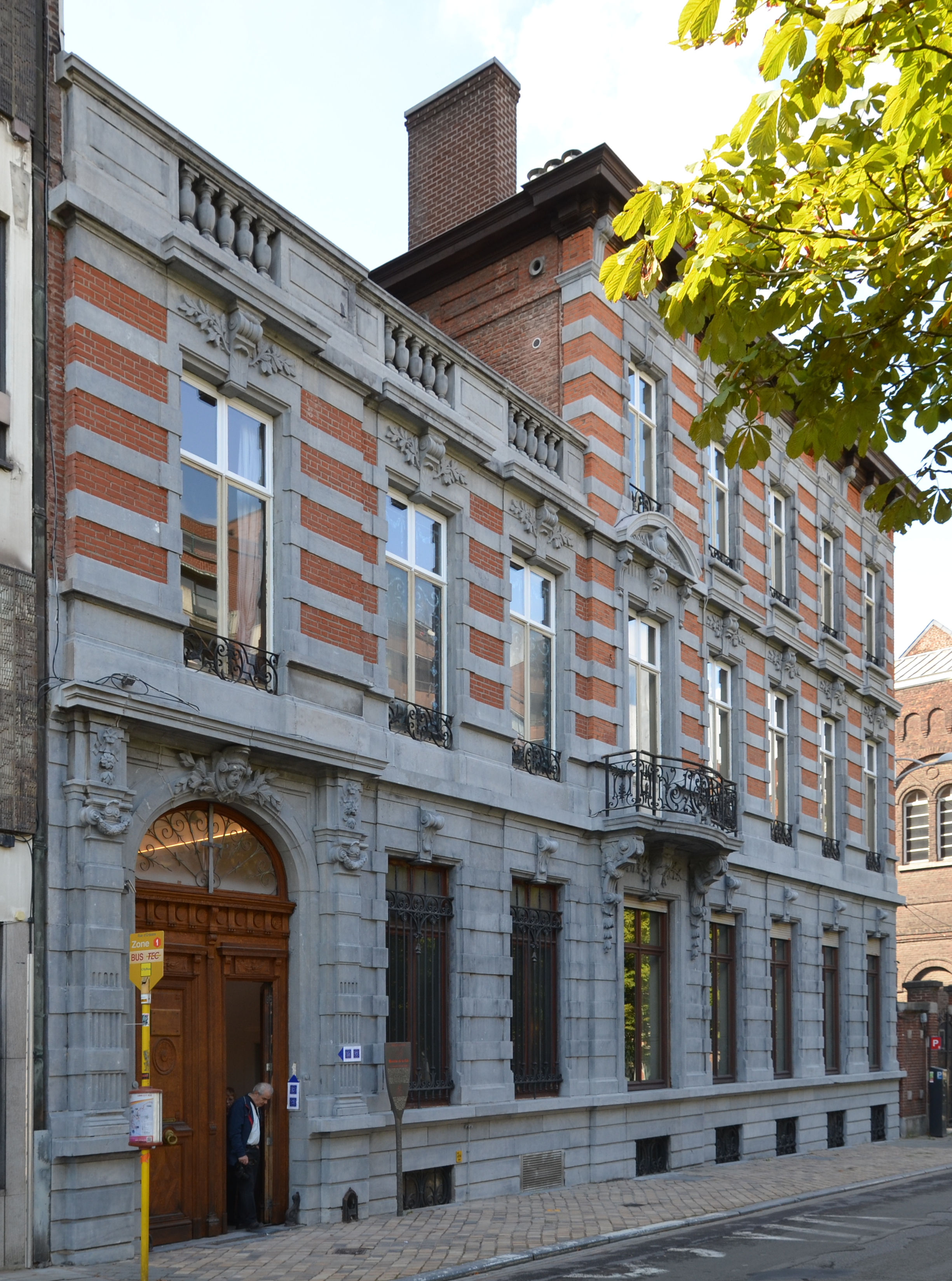 Charleroi (Belgique) - maison de Jules Audent.